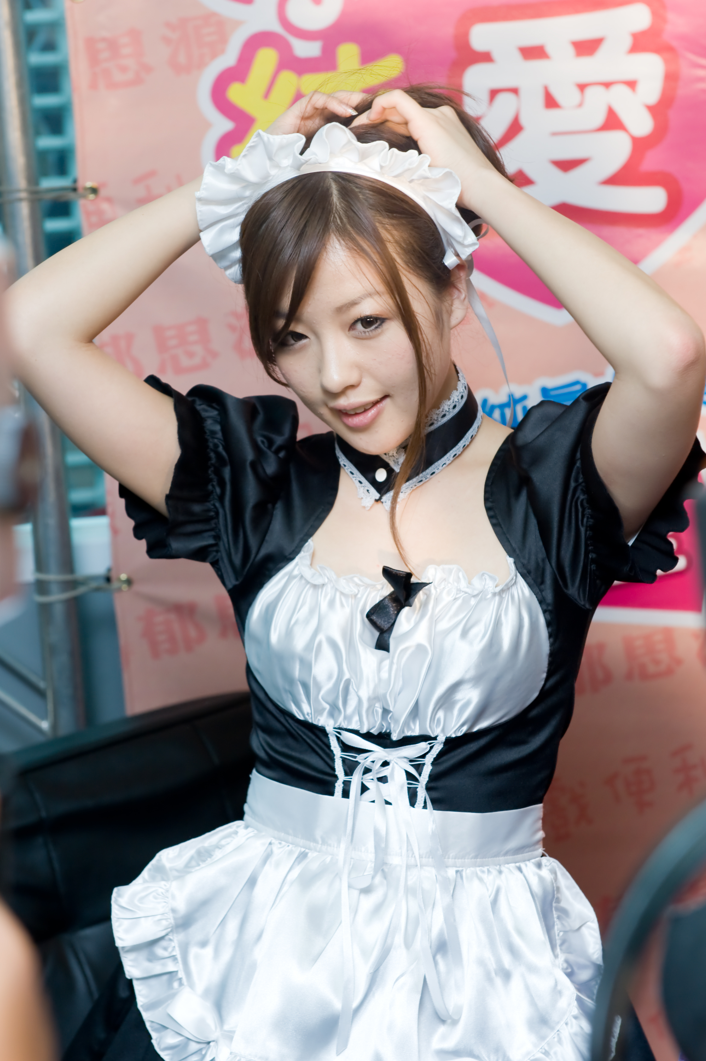 ほしのみゆ